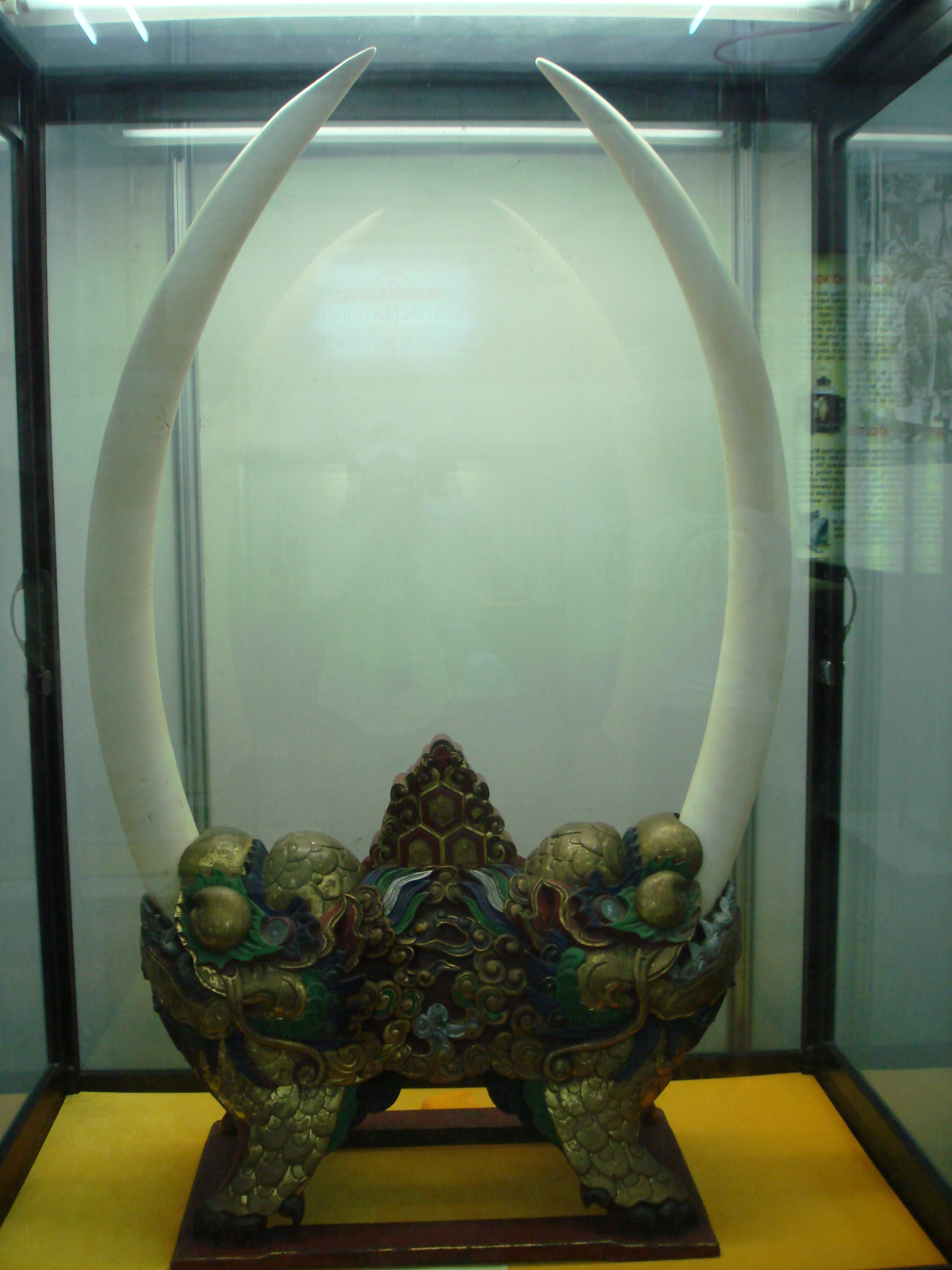 Ngà voi ở Điện Long An.